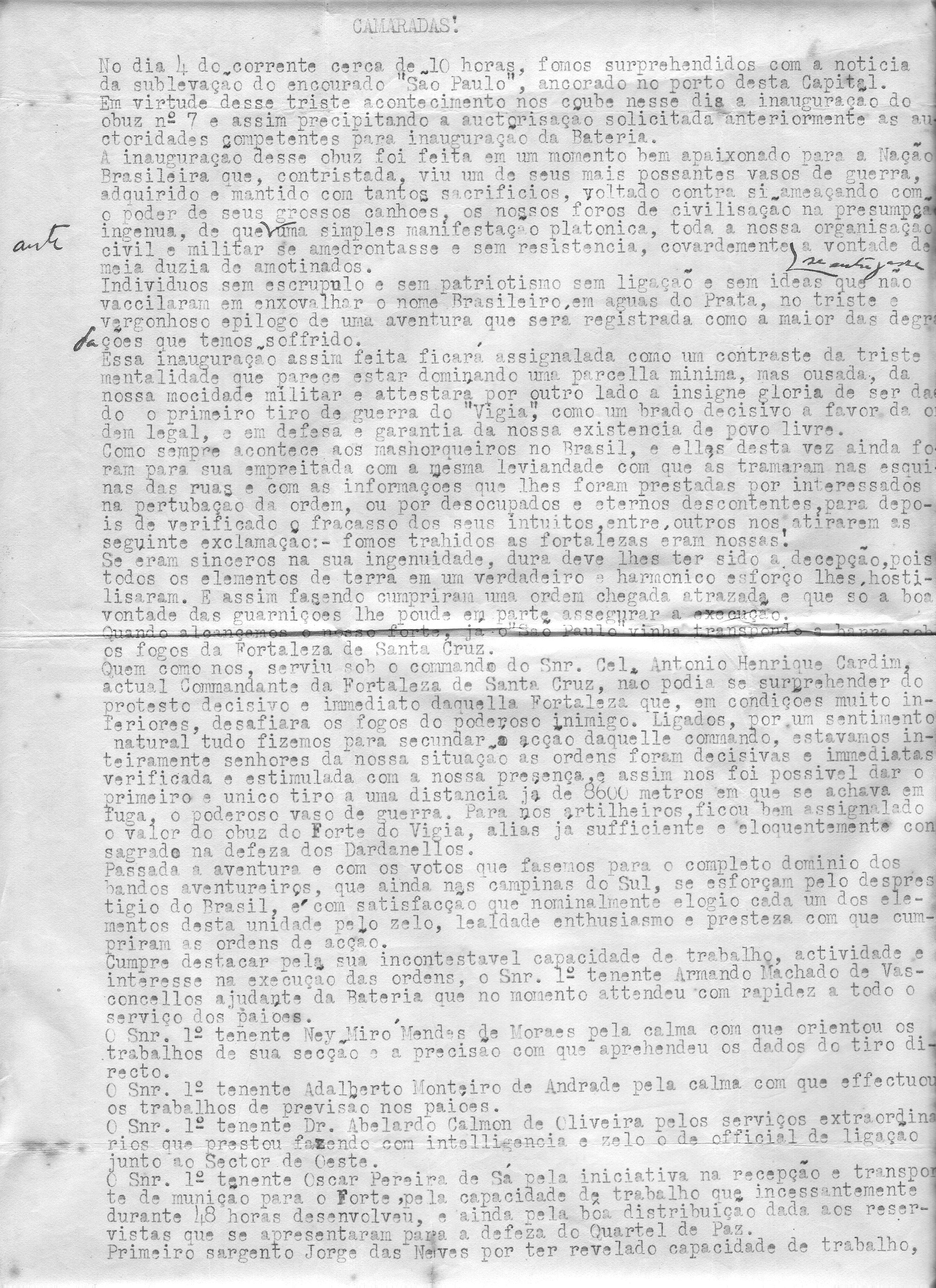 Rascunho da carta relatando o episódio entre a Fortaleza de Santa Cruz da Barra, em Niterói, no estado do Rio de Janeiro e o Encouraçado São Paulo - Pág. 1 de 2